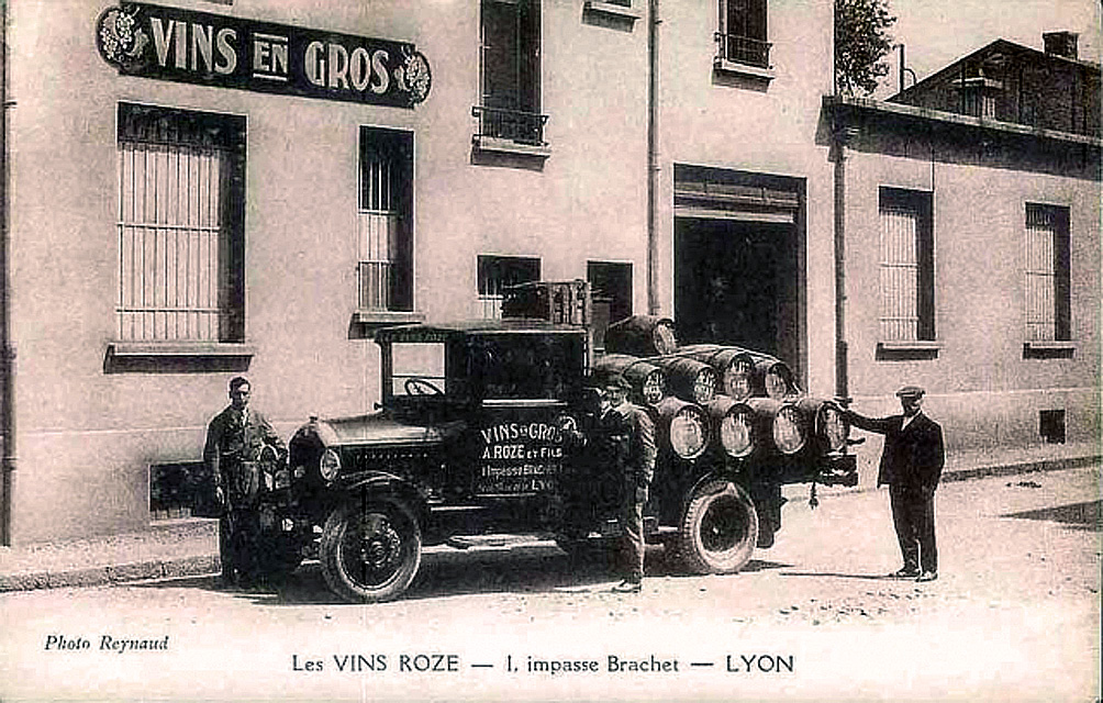 Les vins Roze, 1 impasse Brachet Lyon au début du XXe siècle